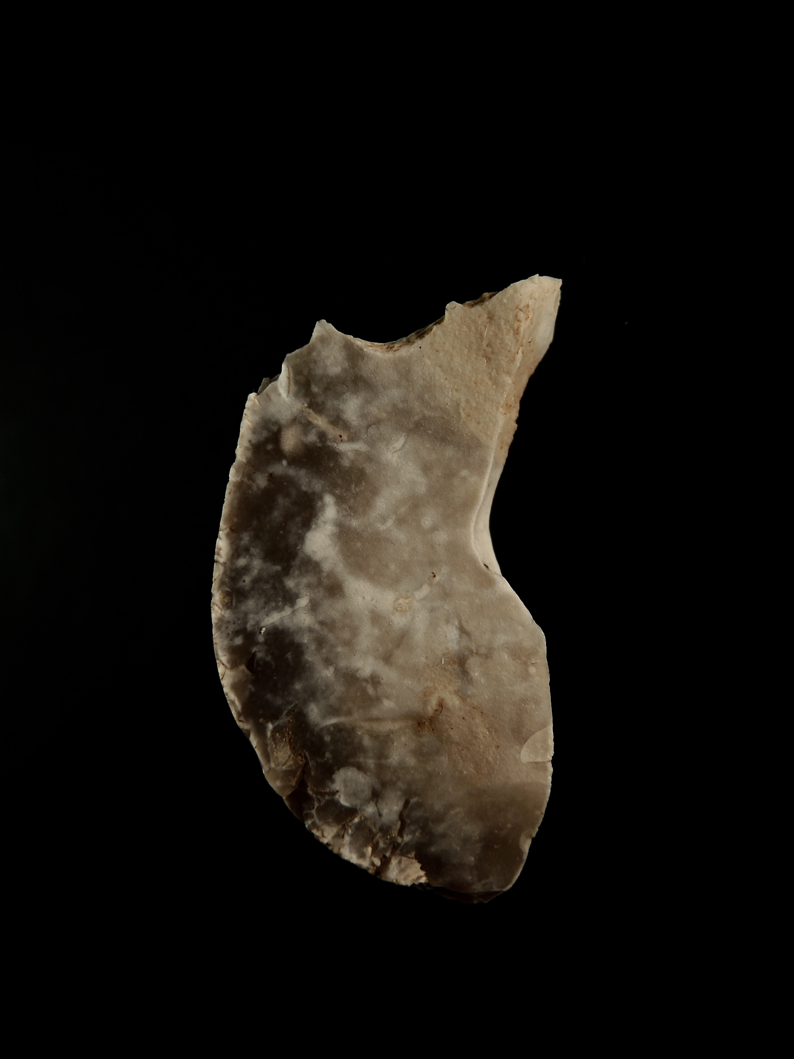 Einfacher Stichel aus nordischen Feuerstein (Länge 3.9 cm) aus dem Fundinventar des spätaltsteinzeitlichen Lagerplatzes von Düsseldorf-Angermund